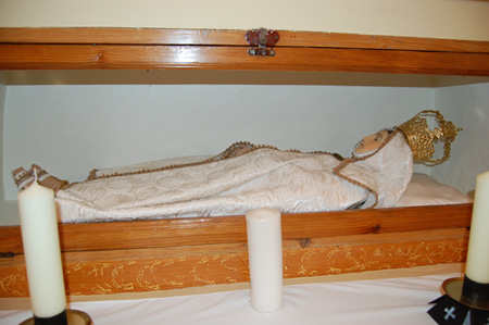 Talla imagen virgen de agosto